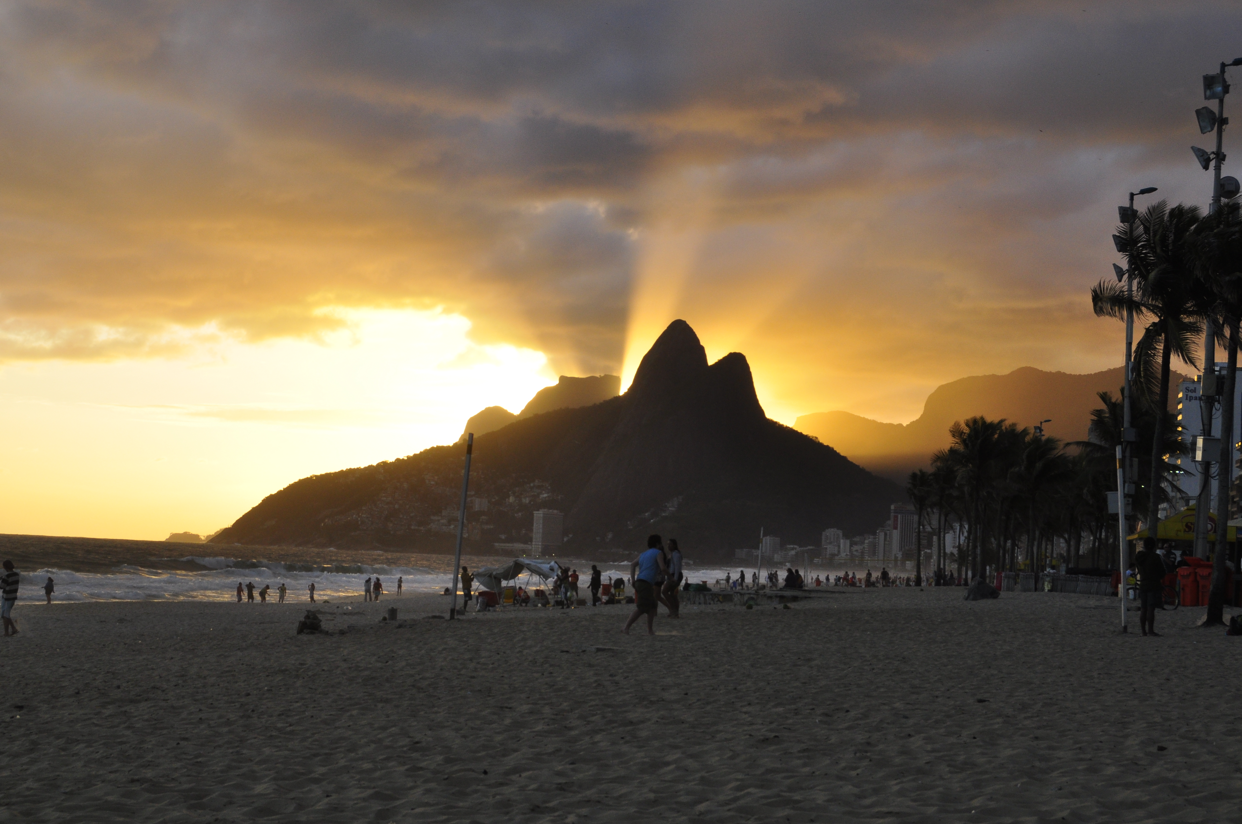 Entardecer na praia de Ipanema, sol descendo atrás do morro Dois Irmãos.